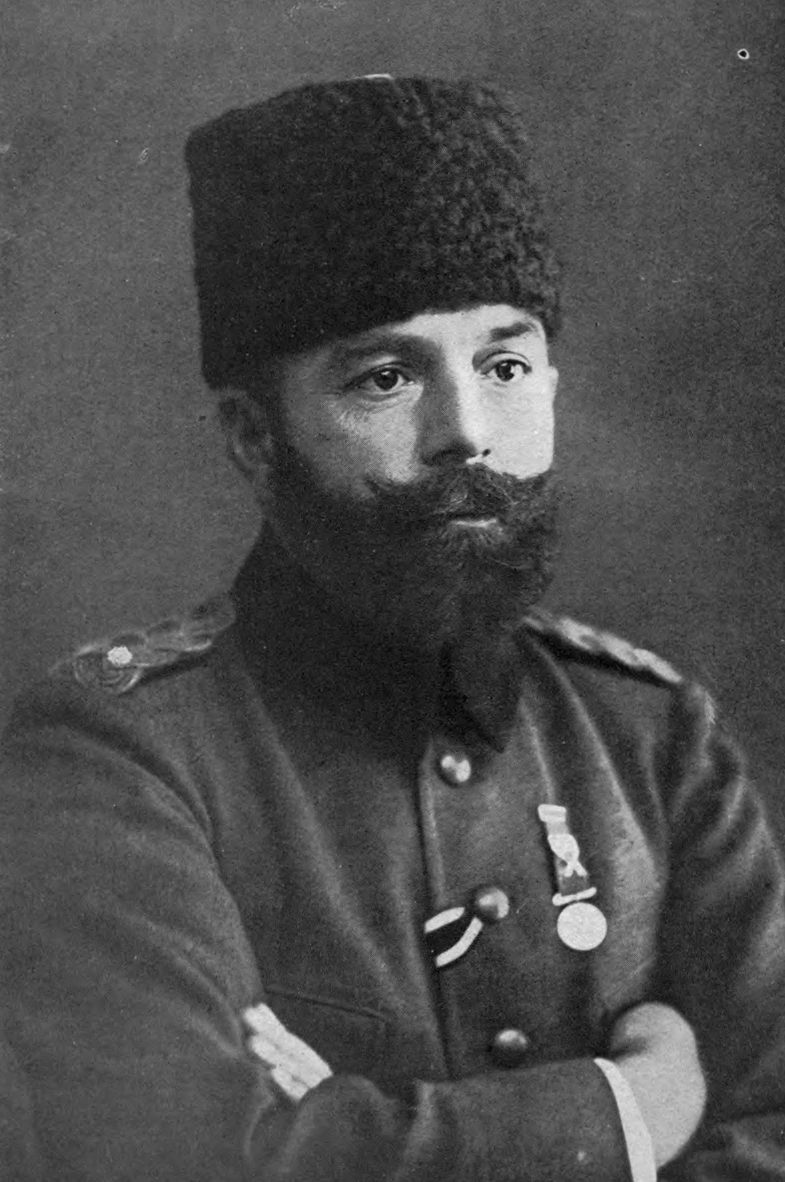 Djemal Pasha